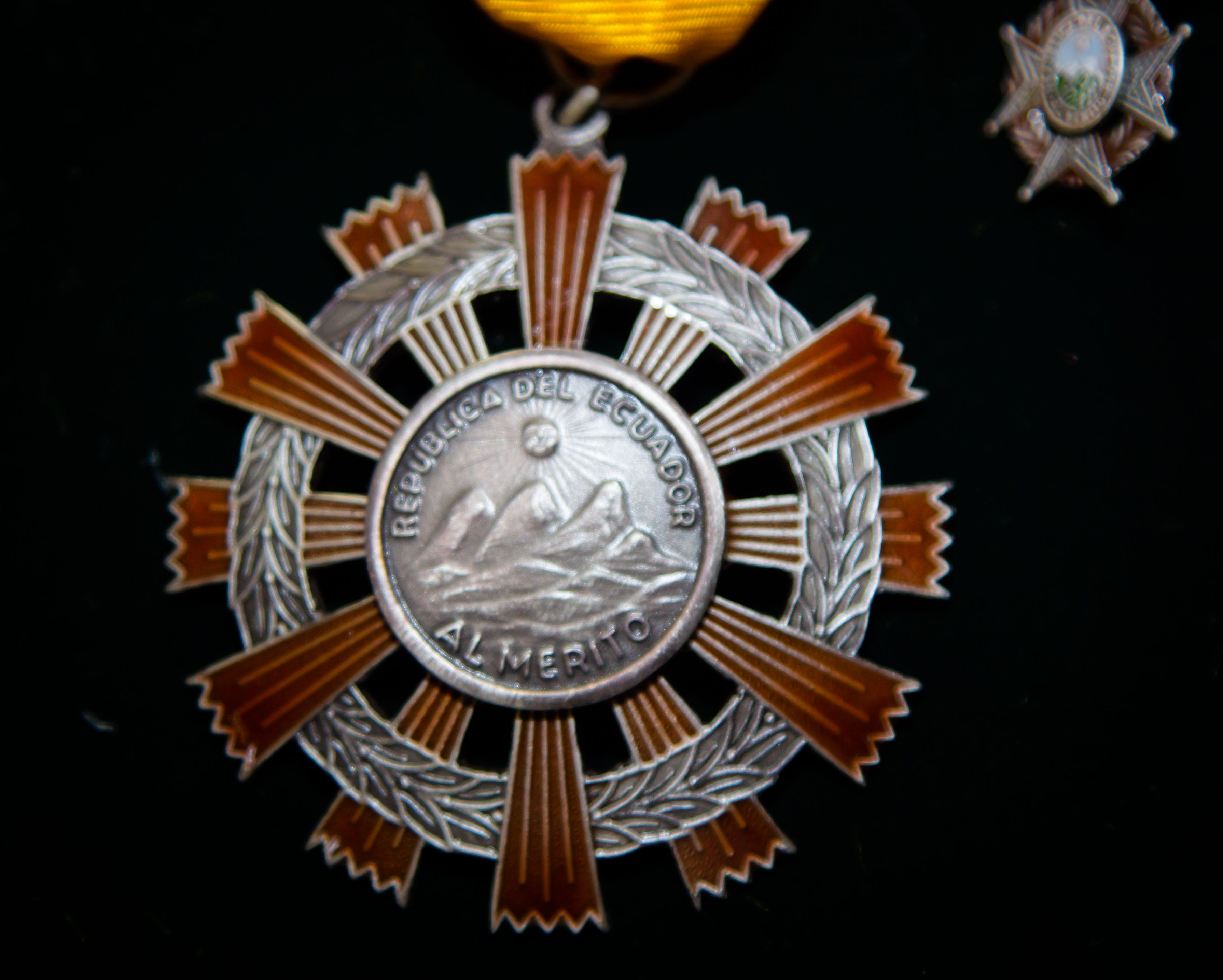 Condecoración Marta Harnecker